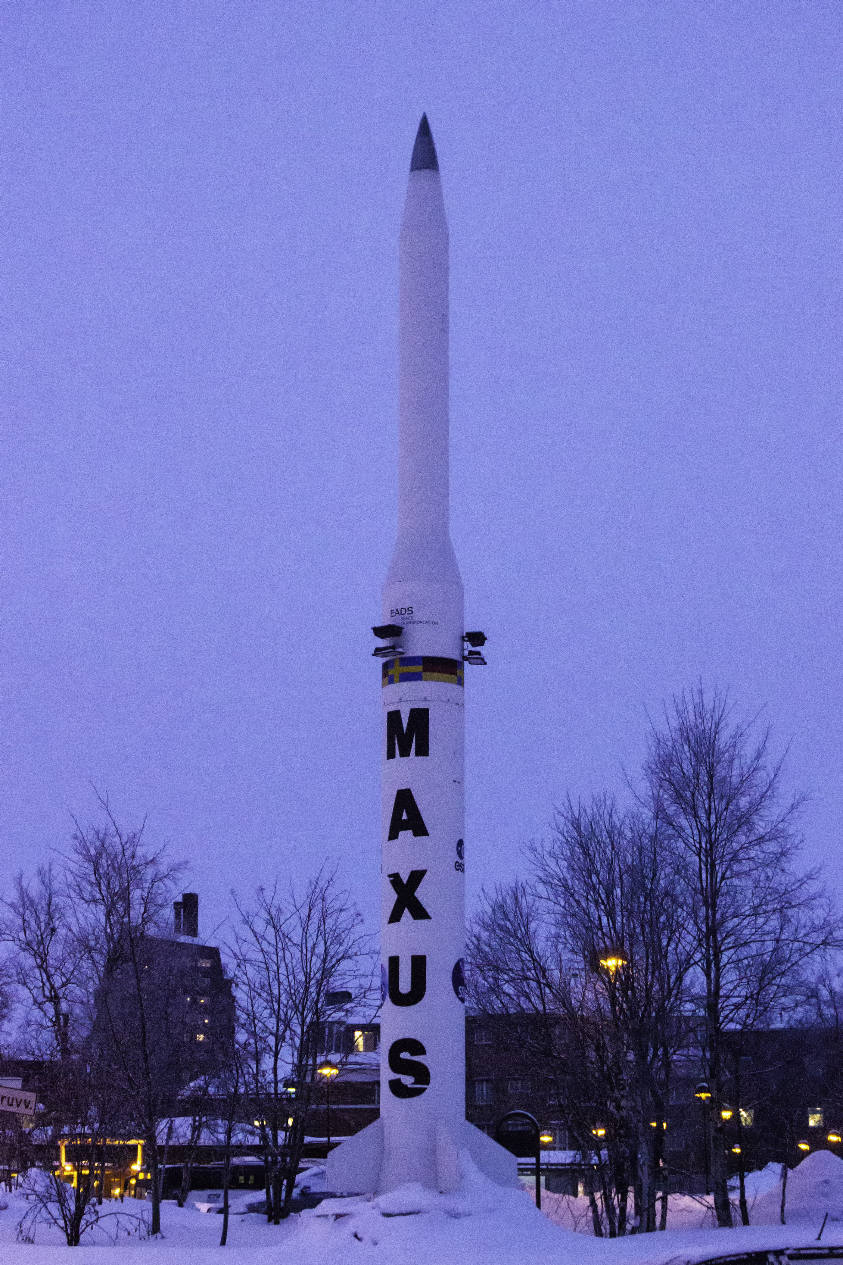 Foguete Maxus en Kiruna, Suecia.